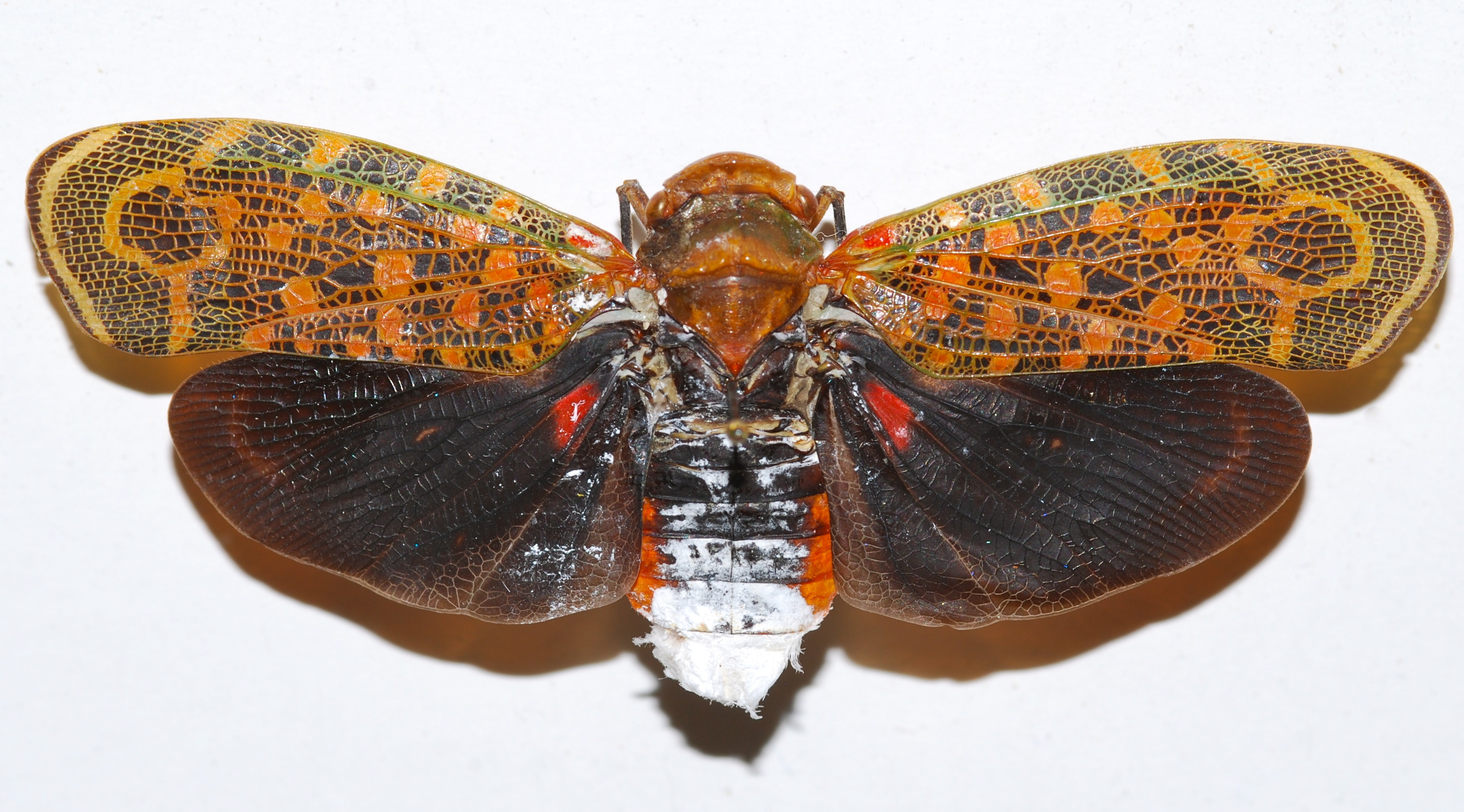 Loreto, Iquitos, PERU